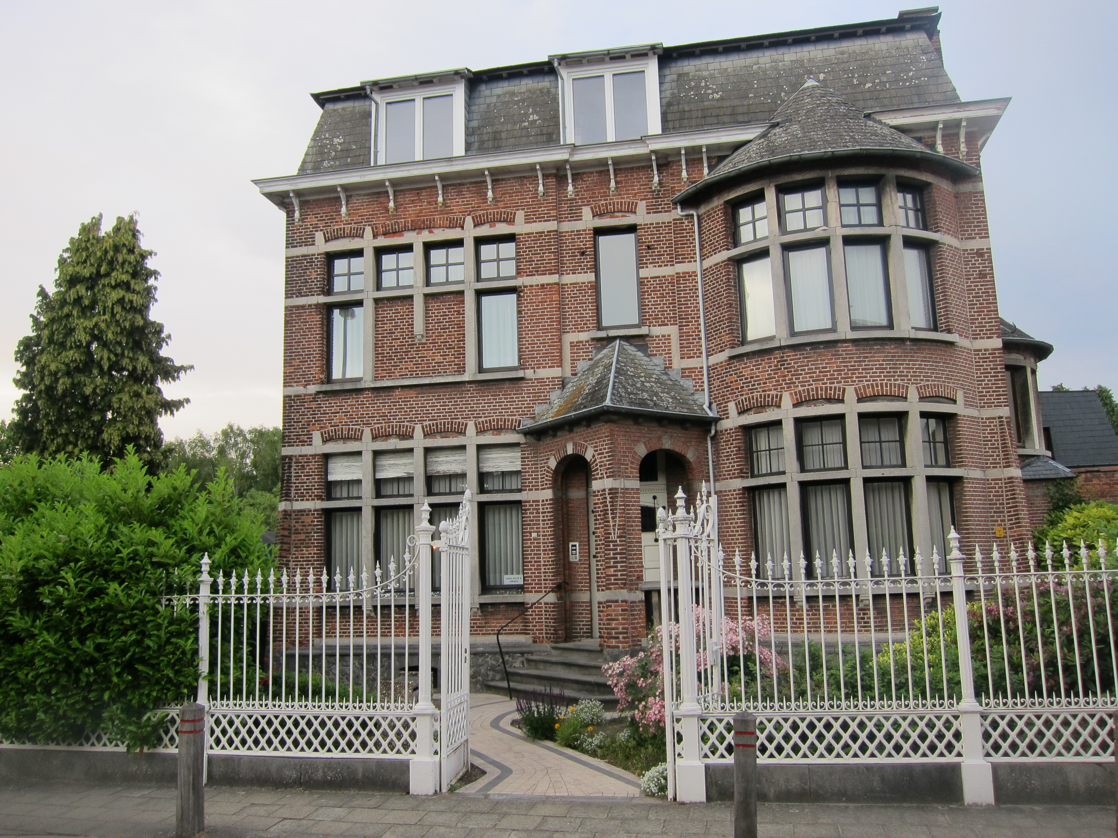 Eclectische woning, Albertstraat 34, St-Katelijne-Waver